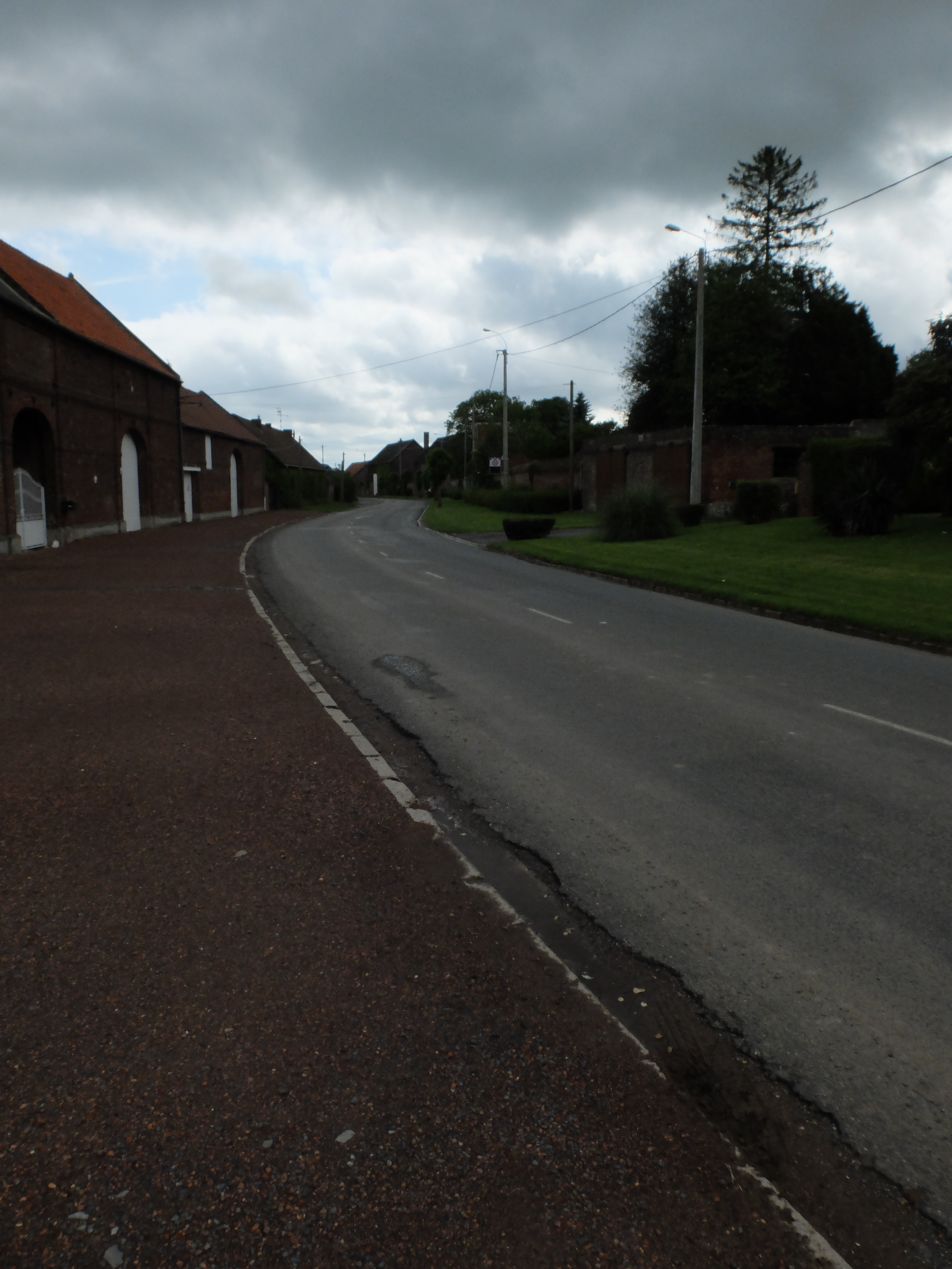 Vue de la Grand Rue de Buissy.